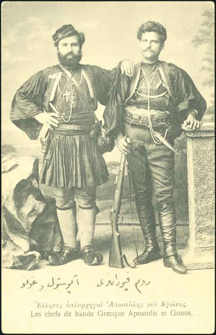 Апостолис Матопулос с Гоно Йотов след Хуриета.